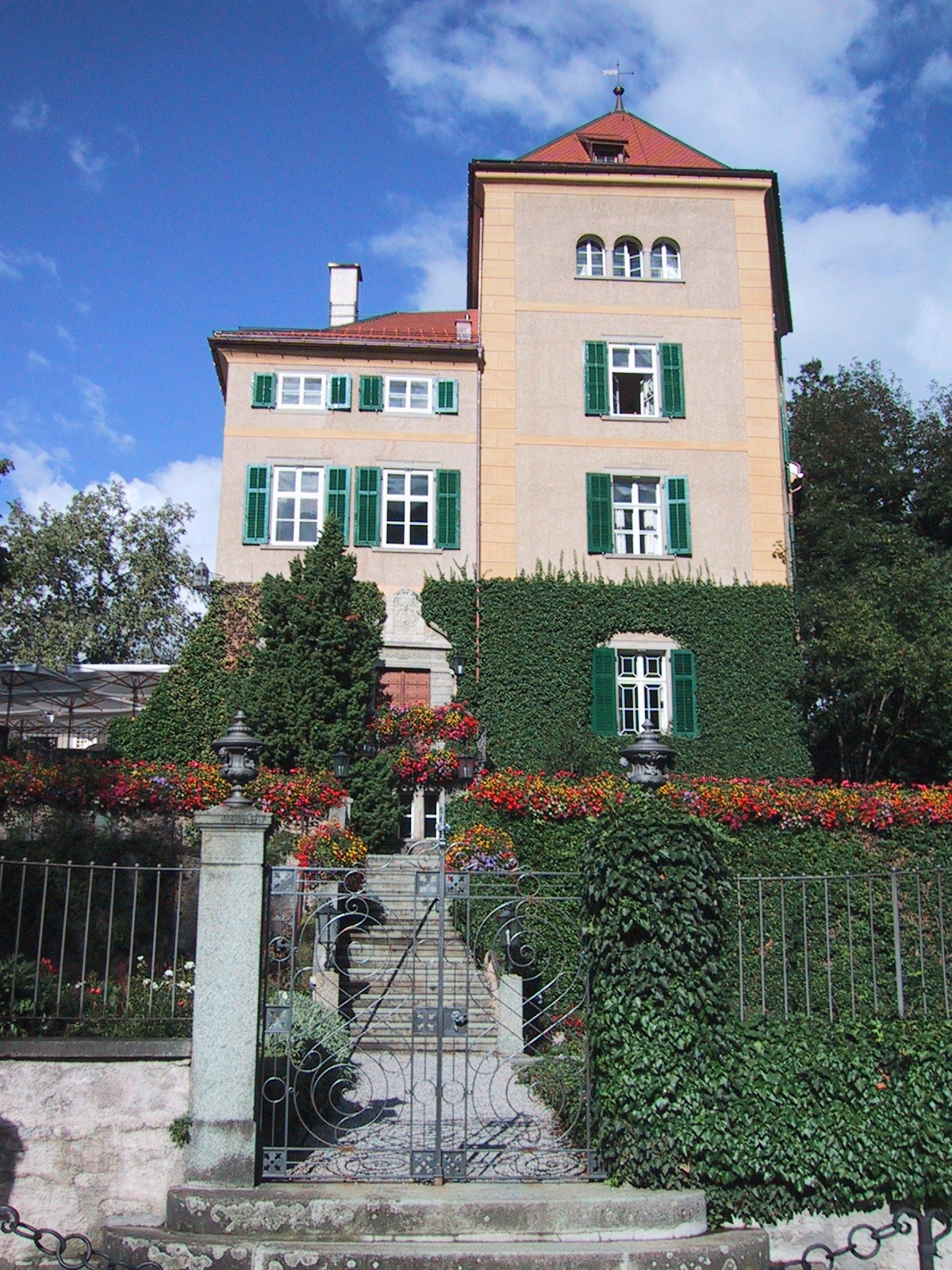 Schloss Schauenstein in Fürstenau, Kanton Graubünden.